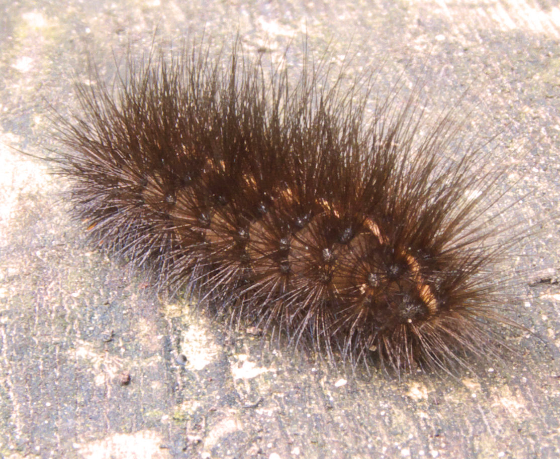 Witte tijger (Spilosoma lubricipeda)